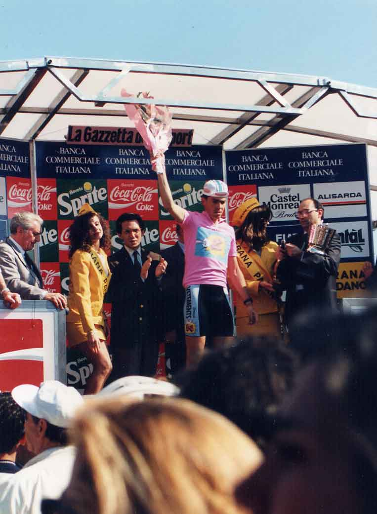 Philippe Casado vine la tappa di Olbia del Giro d'Italia 1991